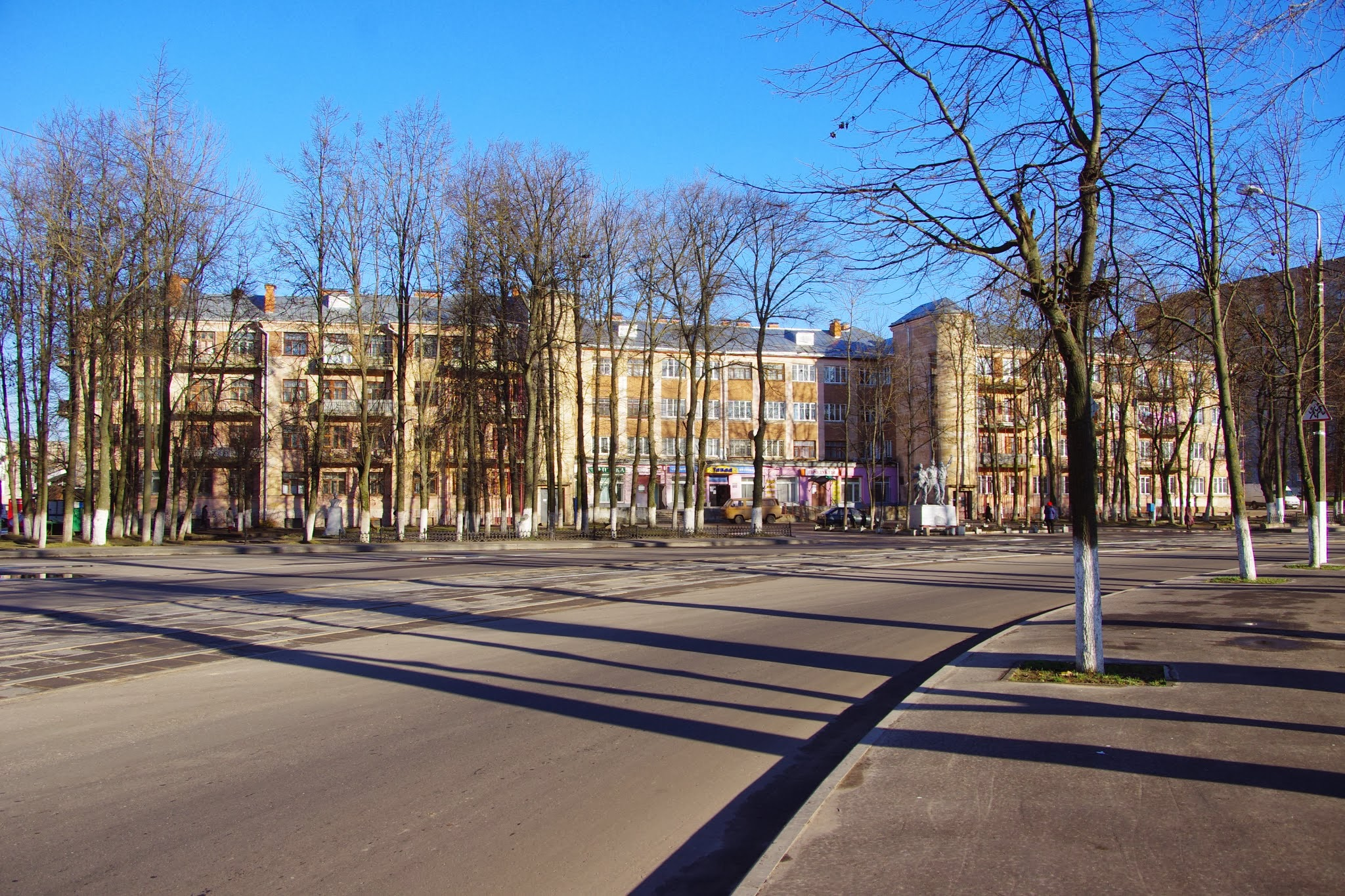 Pieršamajski rajon, Viciebsk, Belarus